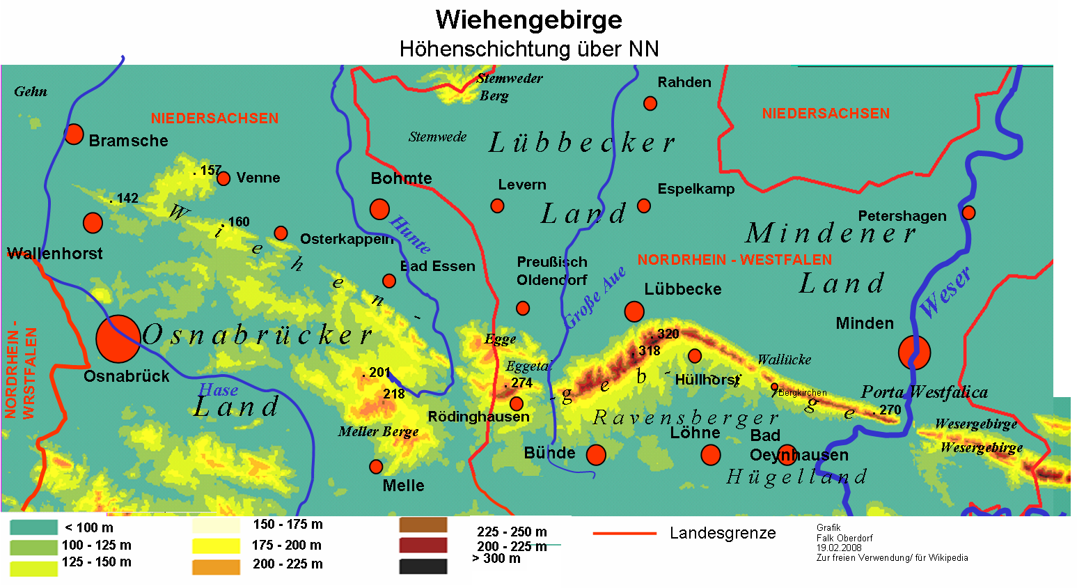 Physische Karte des Wiehengebirges zwischen Bramsche in Niedersachsen und Porta Westfalica in Nordrhein-Westfalen.